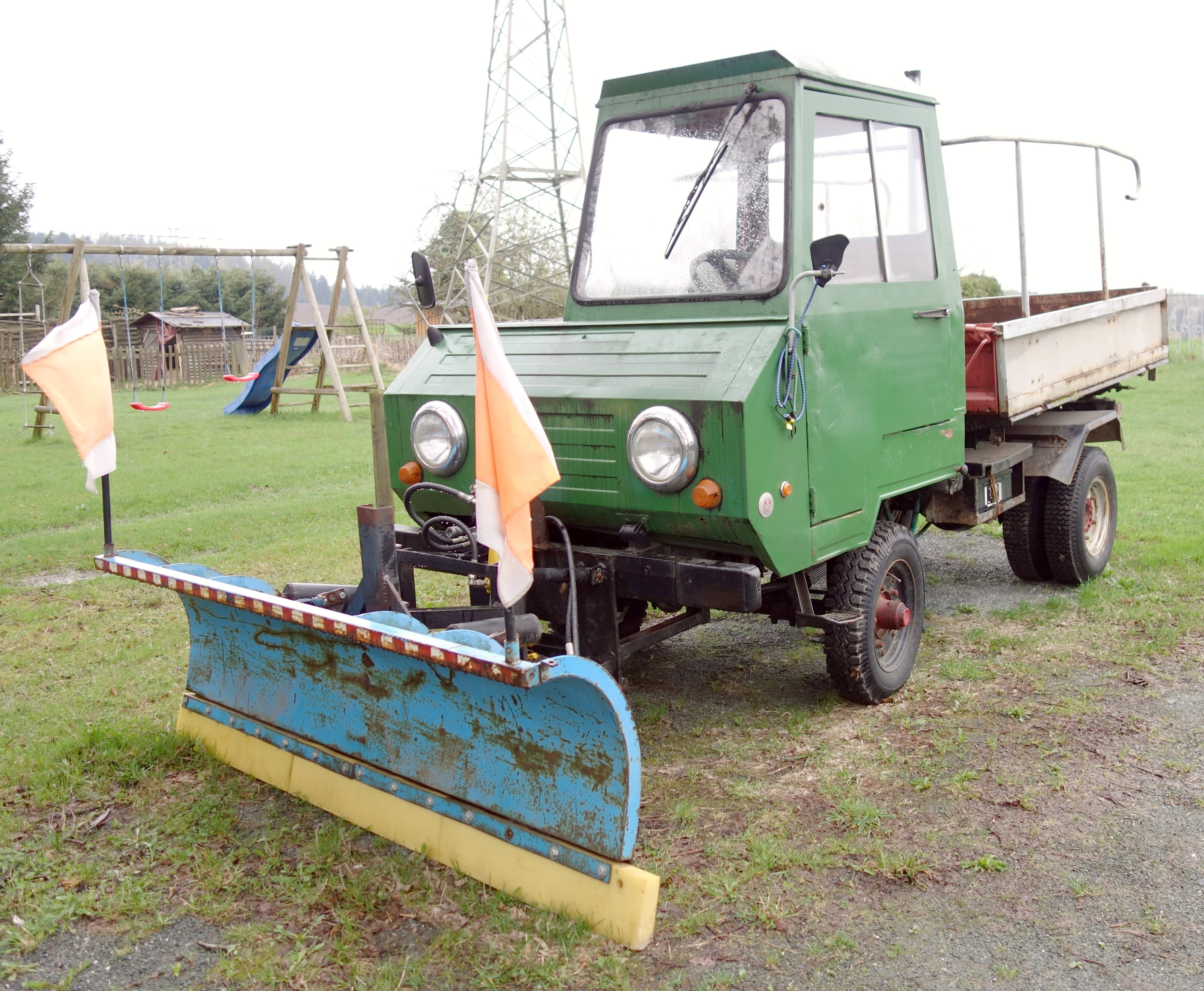 Multicar 24 mit Einsitzerfahrerhaus und Schneeschild (2017).